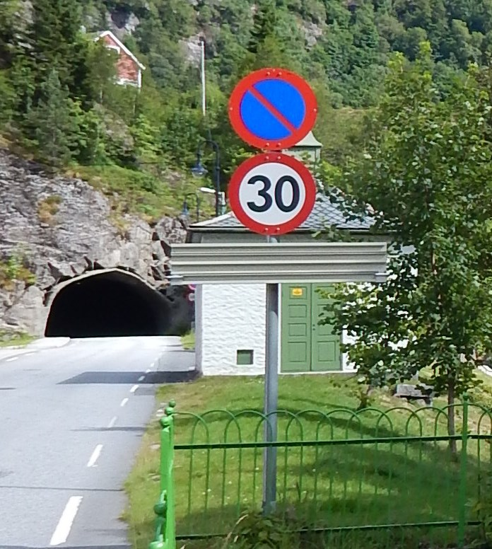 Fylkesvei 5400 (tidl. 314) inn mot Kvamstotunnelen vestfra, i Dale i Vaksdal